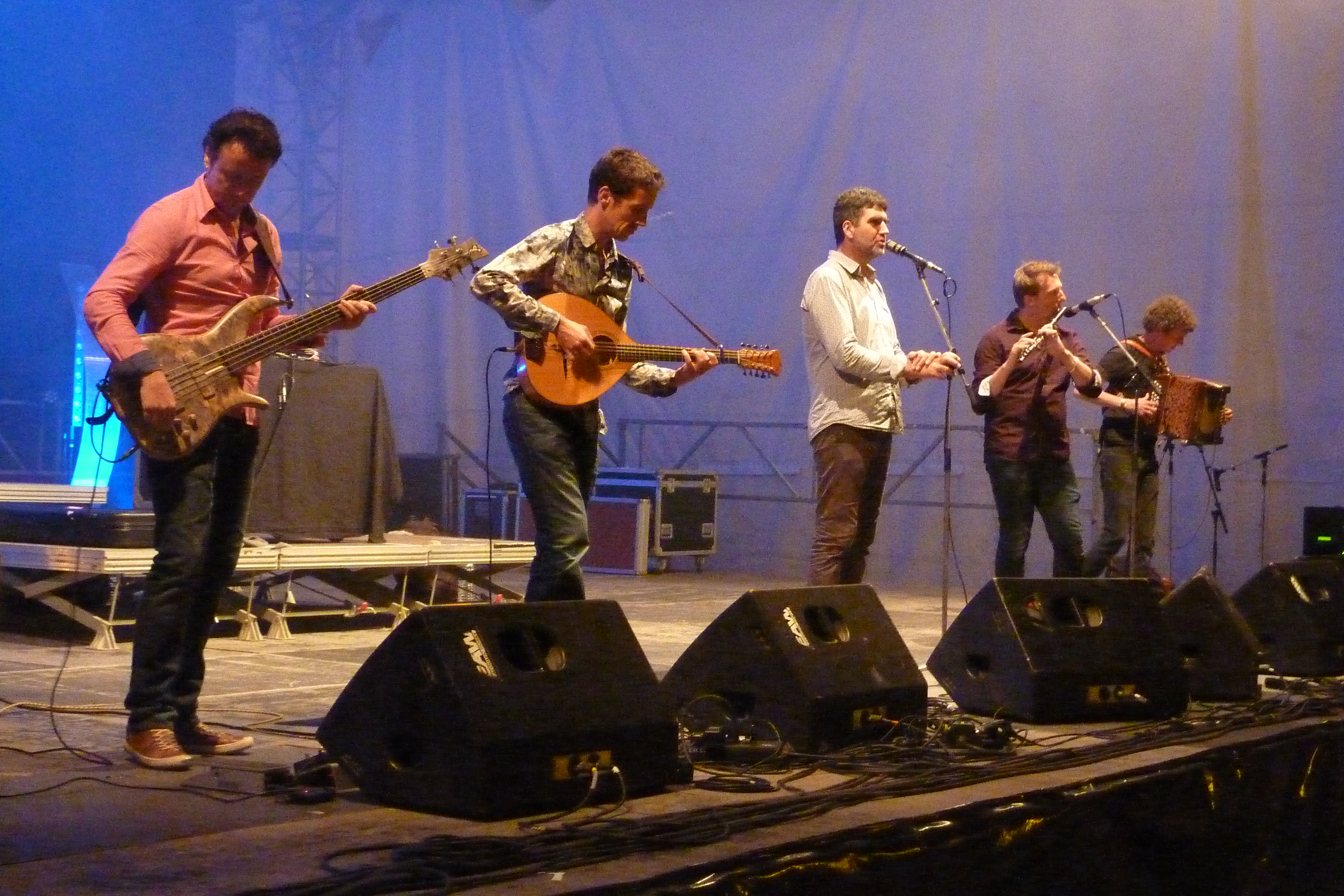 Fête de la Crêpe 2014 à Gourin avec un fest noz animé par Hamon Martin.